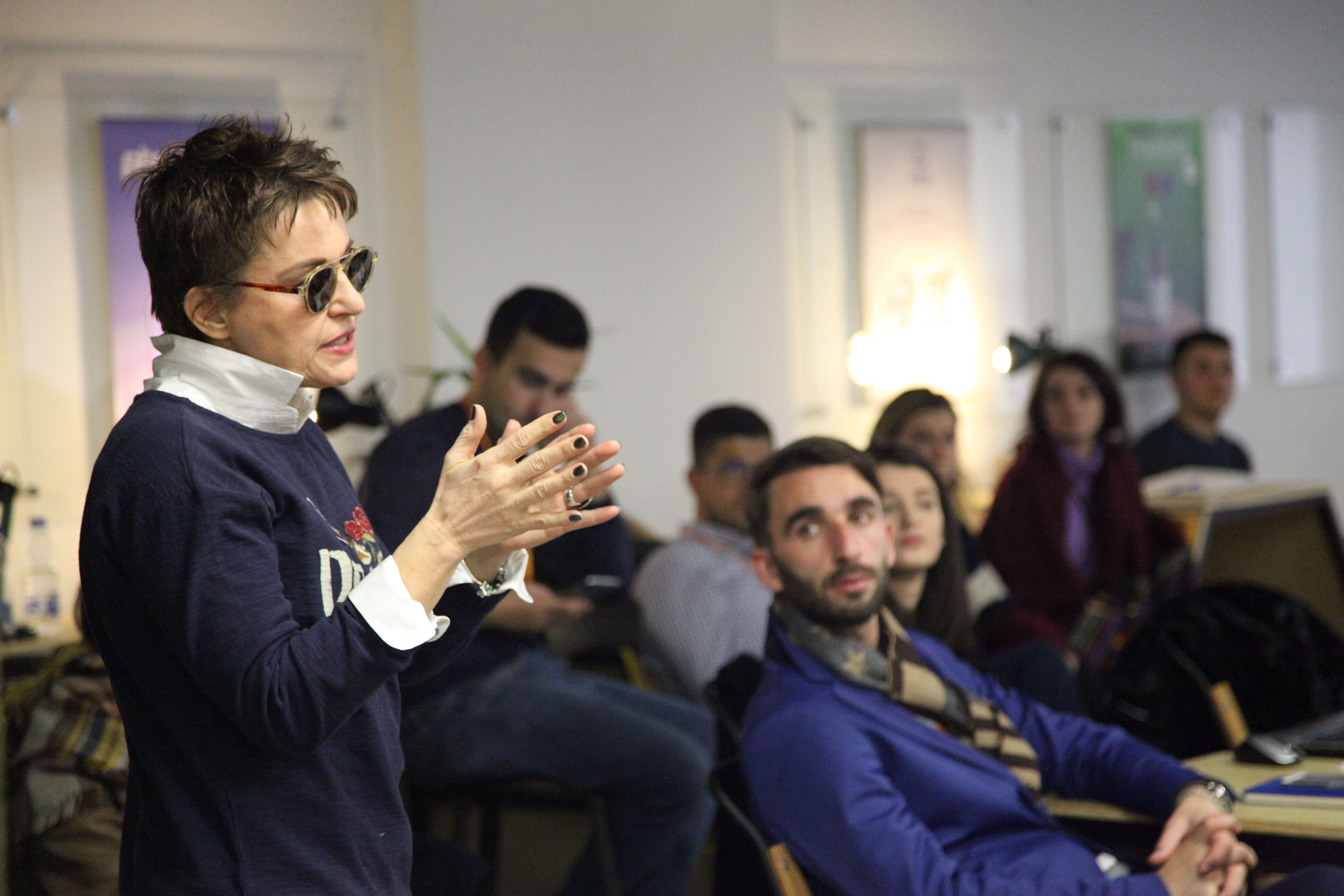 Wiki Academy Kosovo 2018